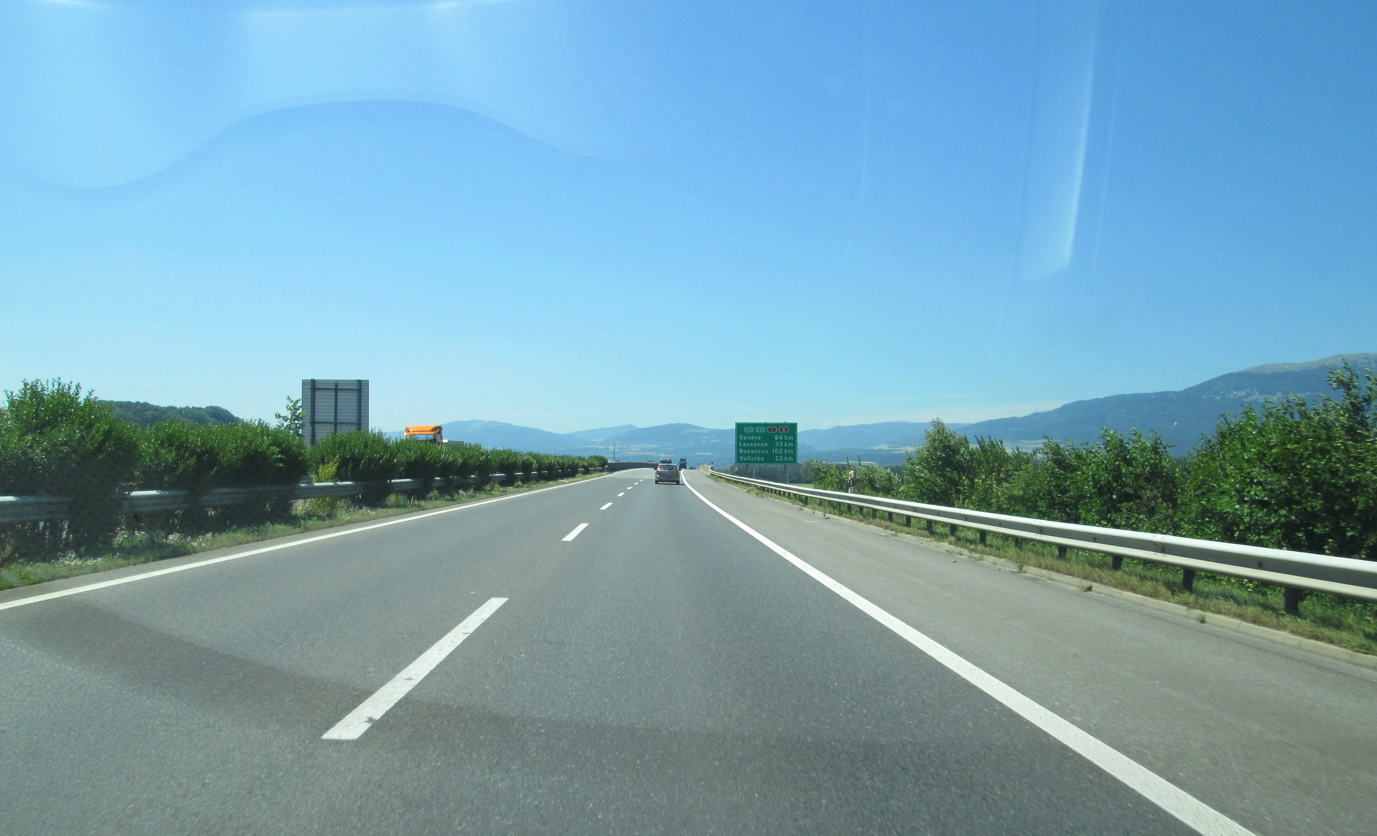 Route E23 E25 en Suisse